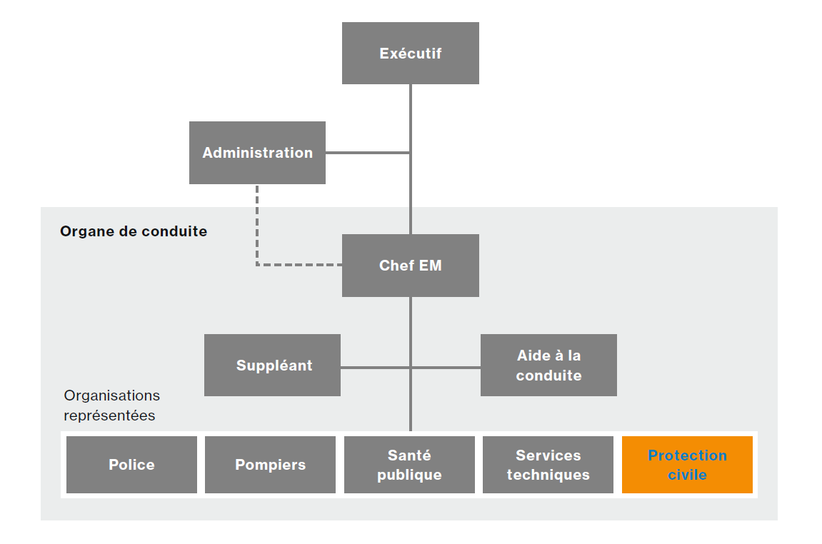 PCi et ses partenaires